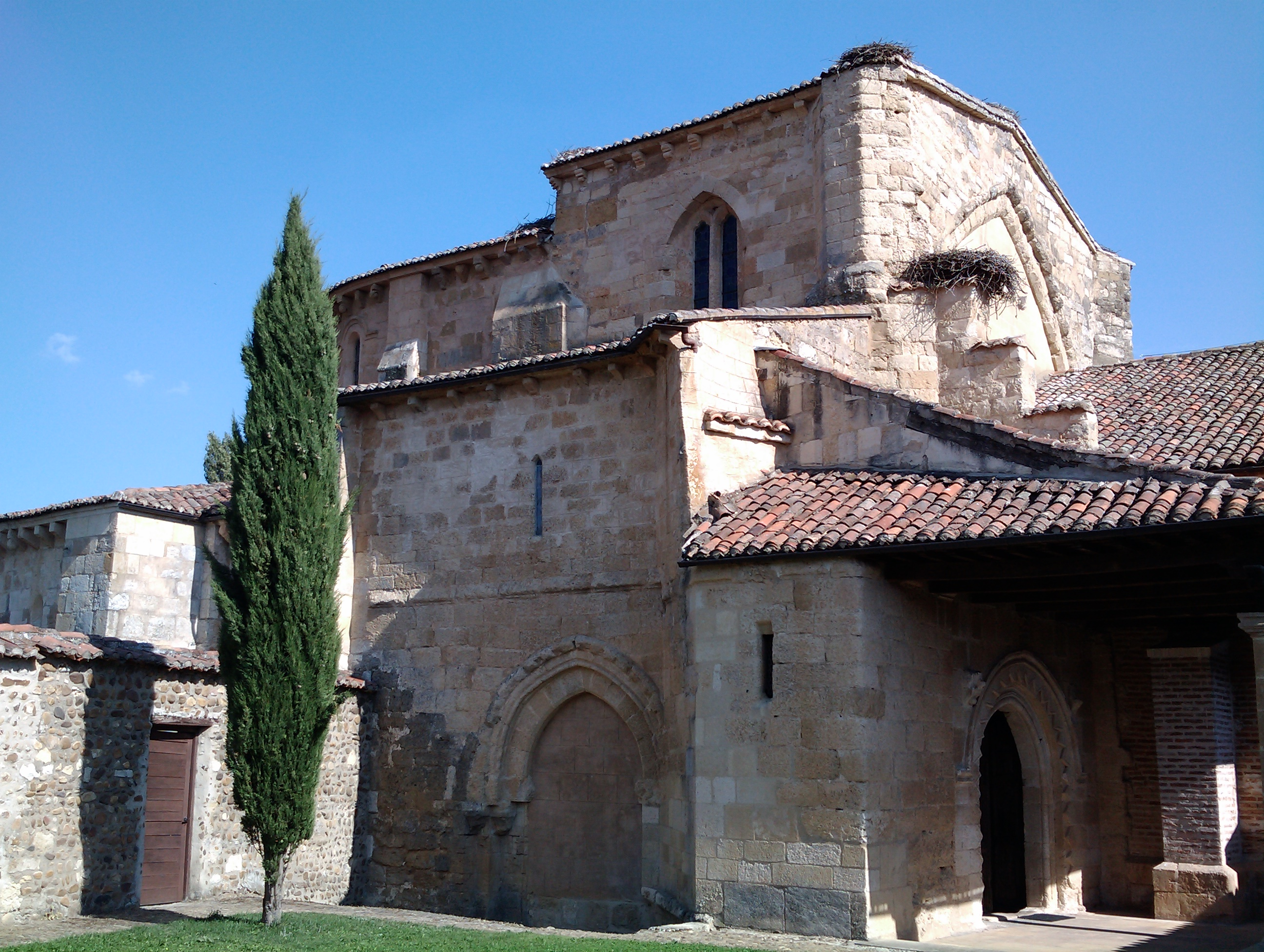 Monasterio de Santa María de Gradefes